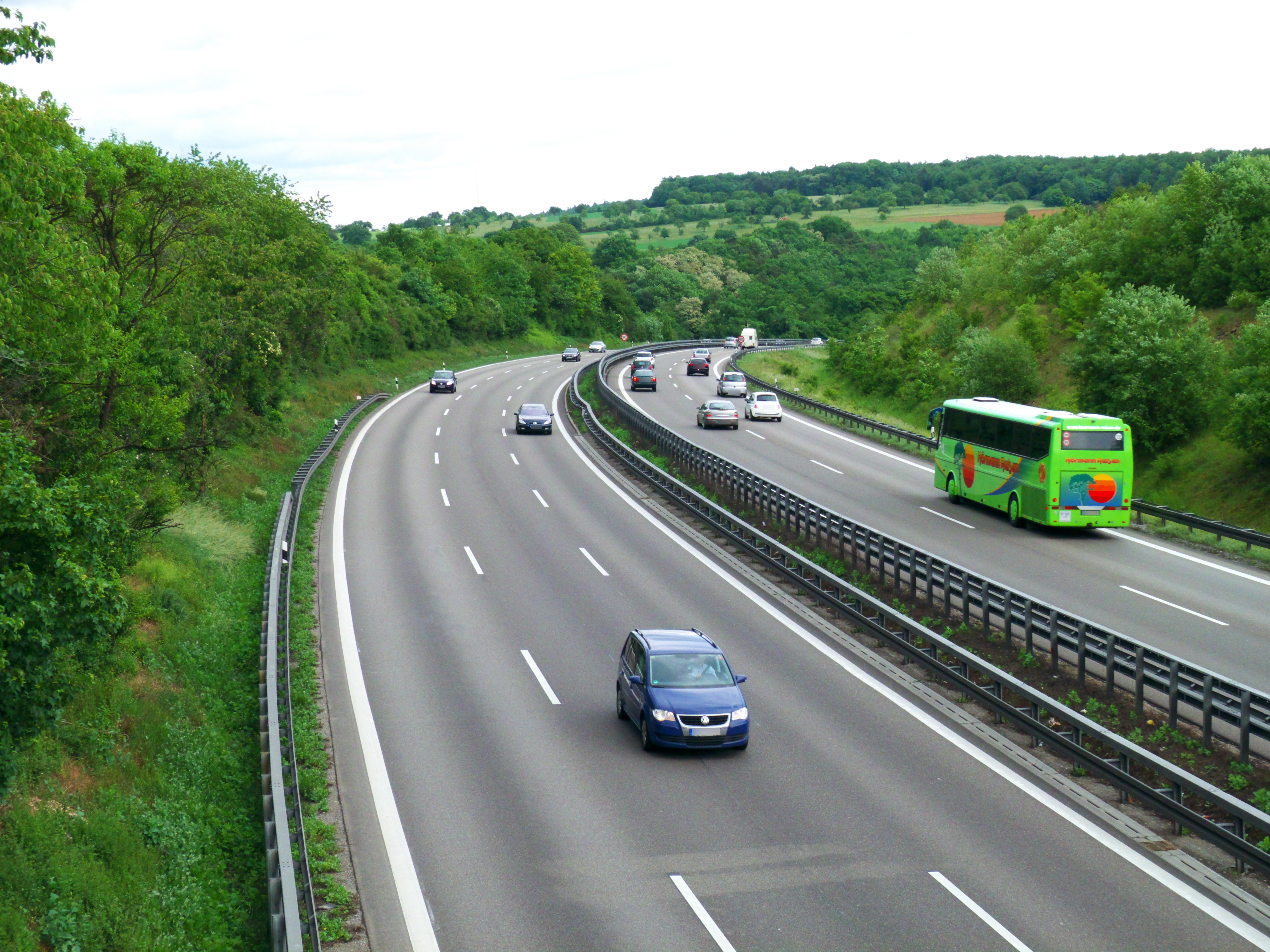 Autobahn 8 bei Pforzheim-Nord in Richtung Pforzheim-Ost, Anfang des Gefälles ins Enztal